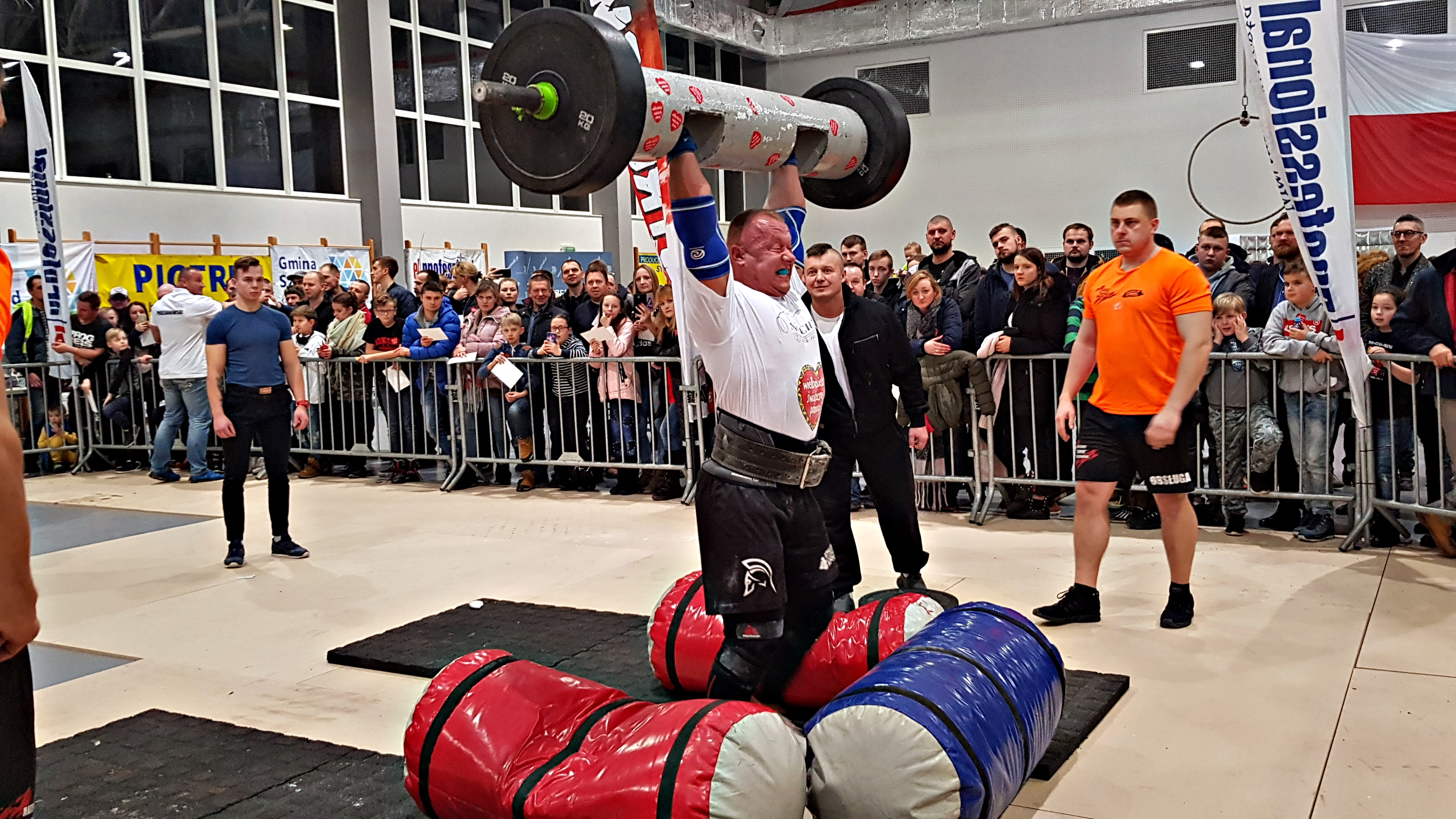 Krzysztof Kacnerski, Halowy Puchar Polski Strongman WOŚP Rumia 2019